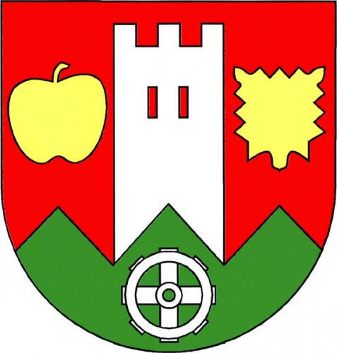 znak, Věžná, okres Žďár nad Sázavou